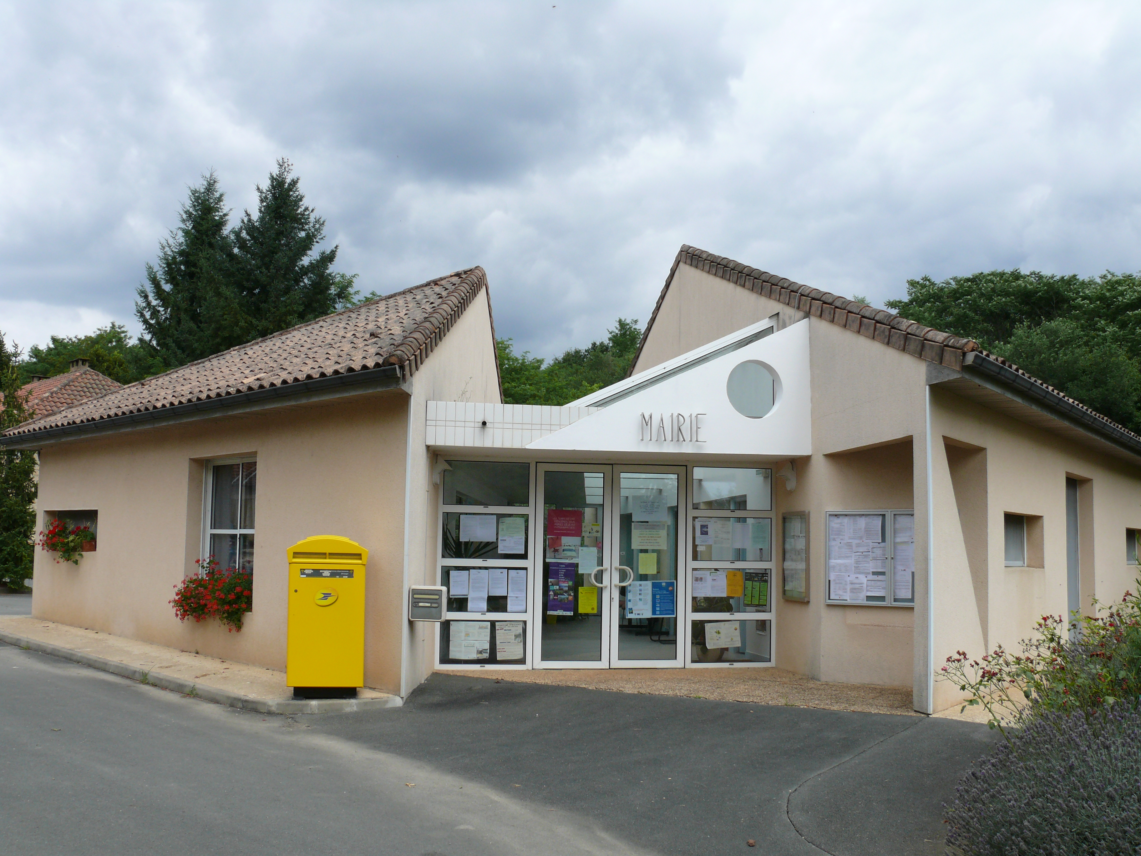 Mazeyrolles - Mairie au Got